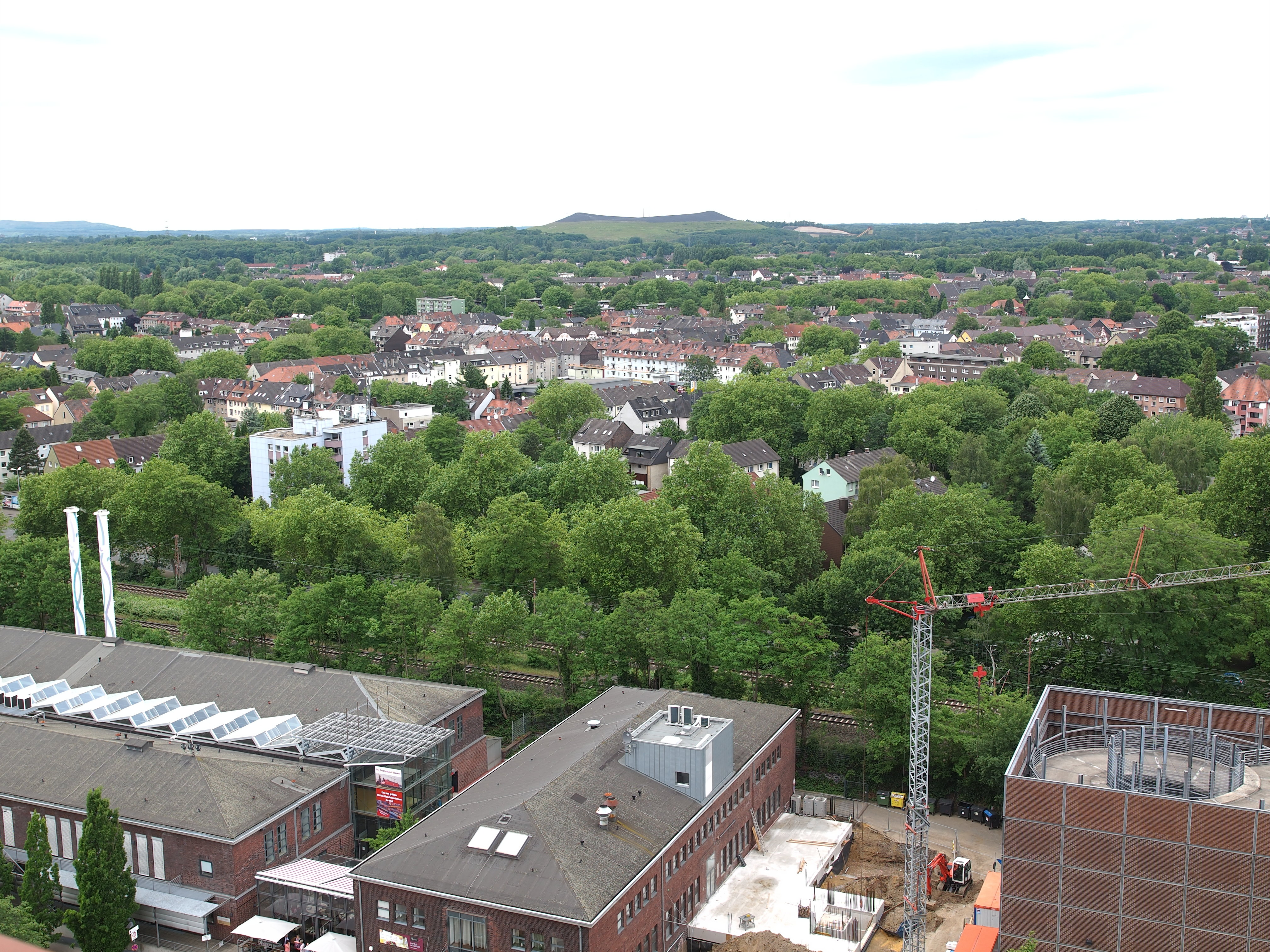 Zeche Nordstern, Gelsenkirchen, Blick vom Förderturm von Schacht 2 nach NW mit der Mottbruchhalde in Gladbeck